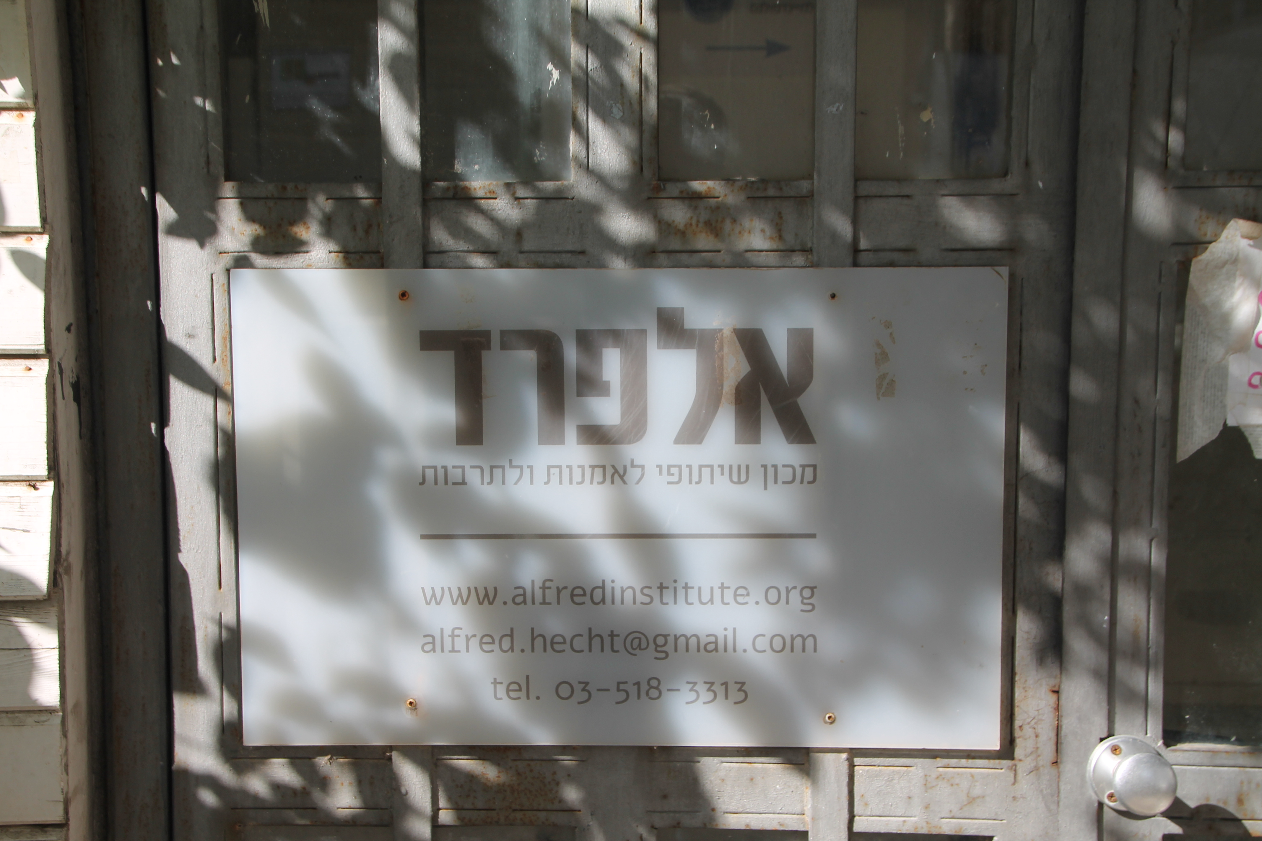 גלריה אלפרד עם סמל ופרטים נוספים